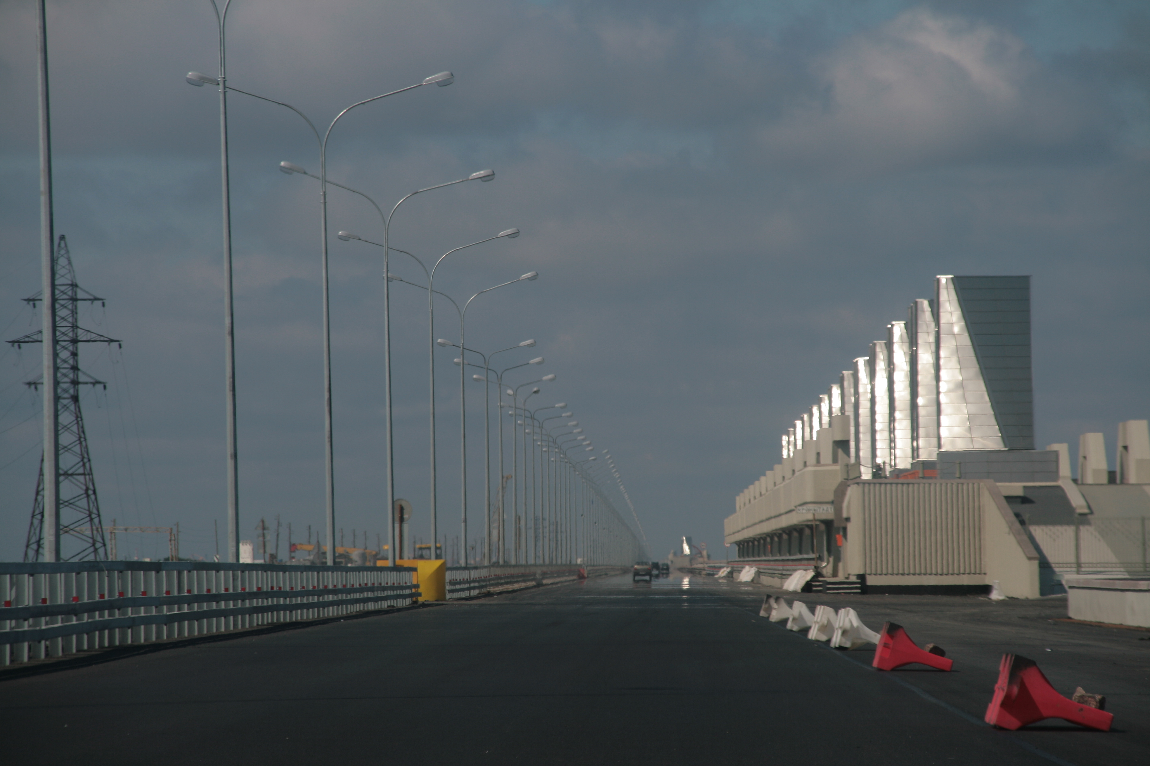 Водопропускные сооружения на дамбе СПб. Ближайшие к Горской (В-6) в 2009 году, завершения строительства.